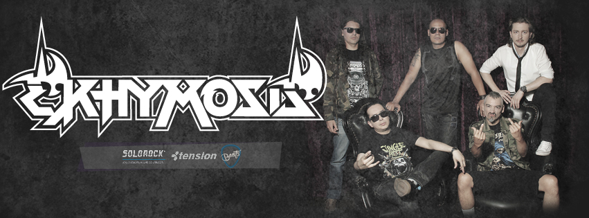 Ekhymosis 2015